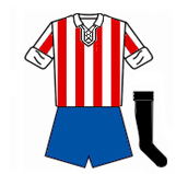 Equipación de uno de los 5 equipos padres de la UD Las Palmas.